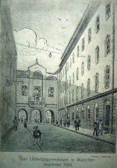 Das alte Gebäude des Ludwigsgymnasiums in der Münchner, das sich noch in der Innenstadt befand